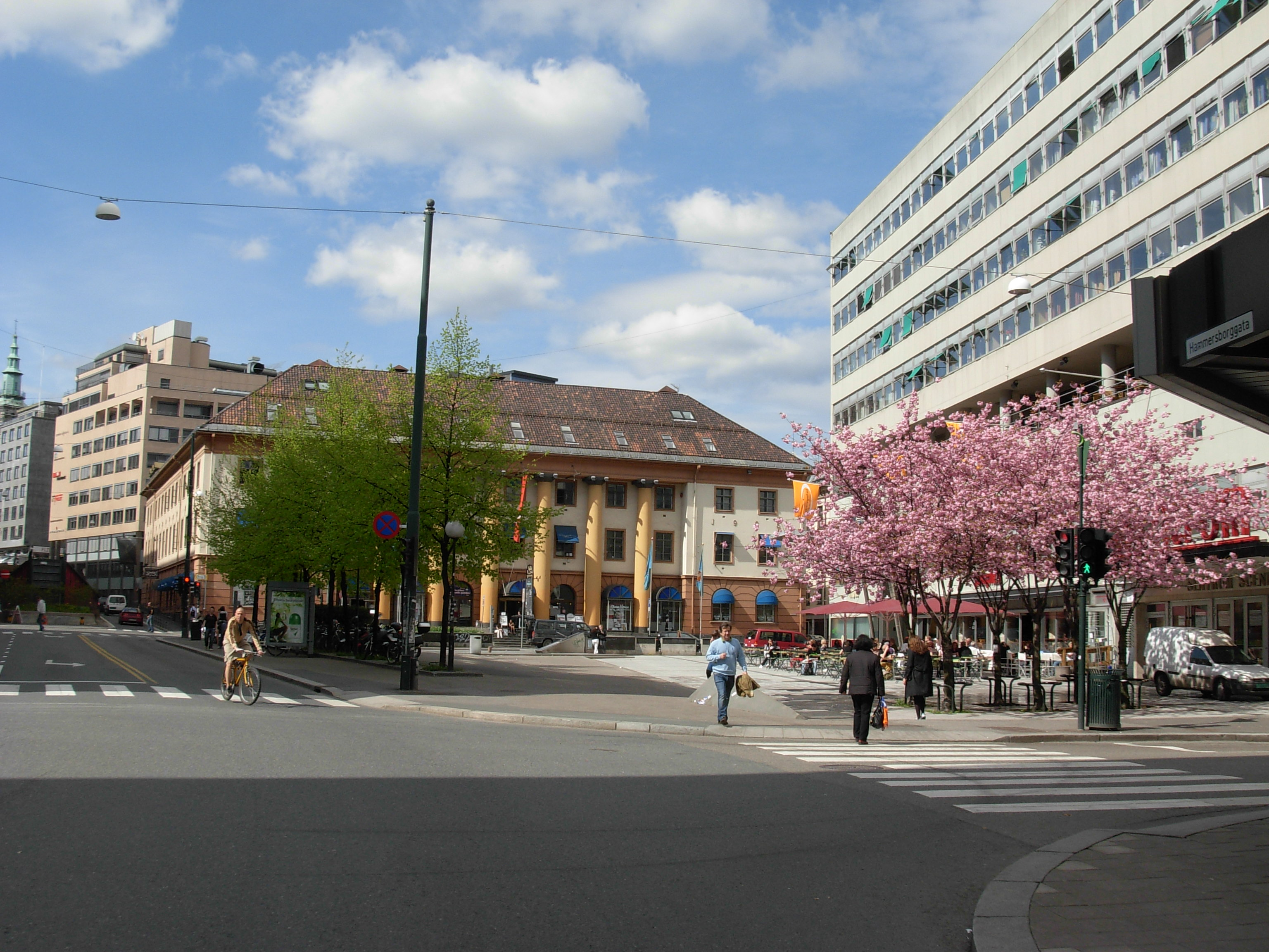 Arbeidersamfunnets plass, Oslo